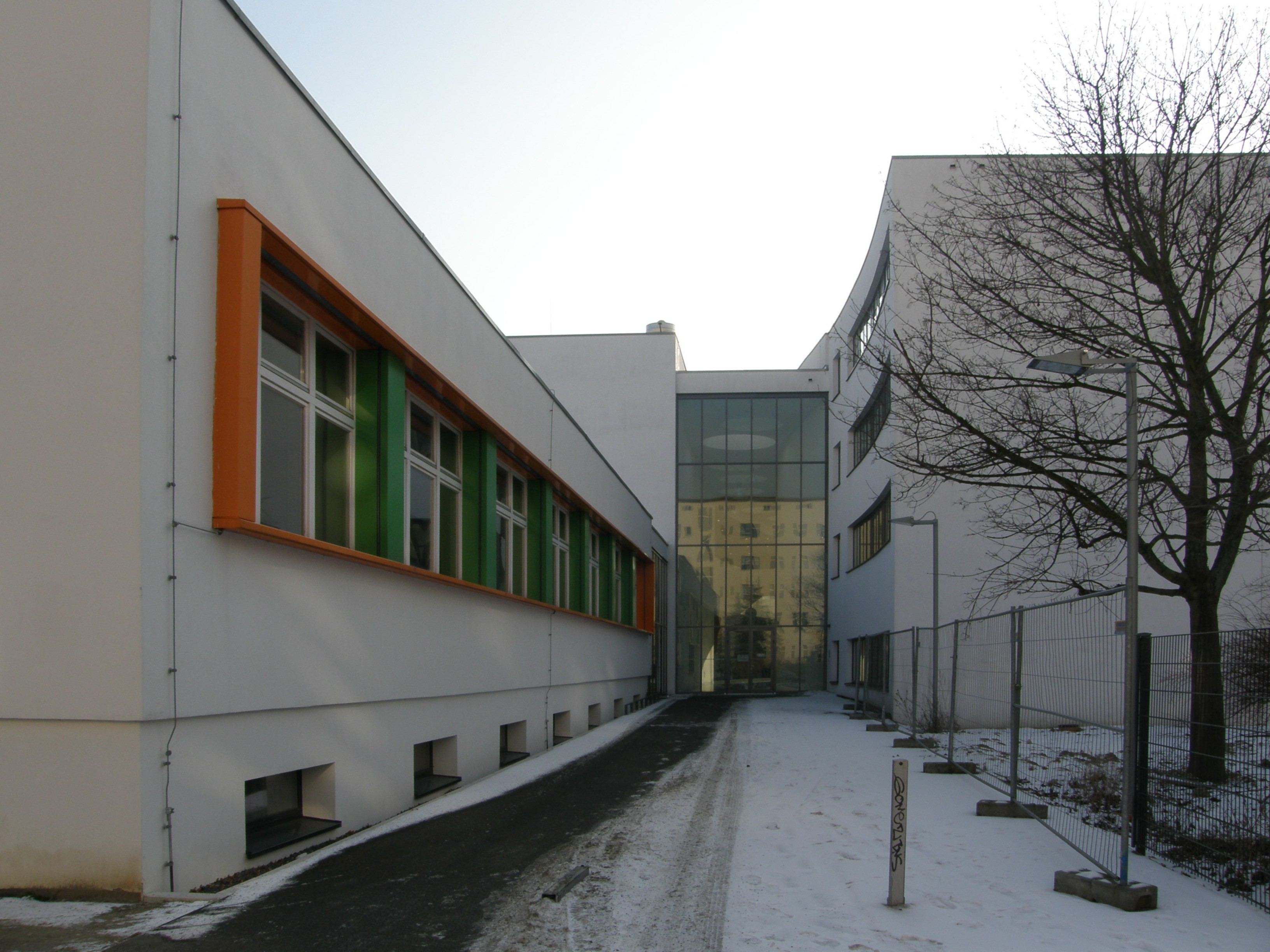 Berlin-Prenzlauer Berg, Gubitzstraße: Staatliche Ballettschule